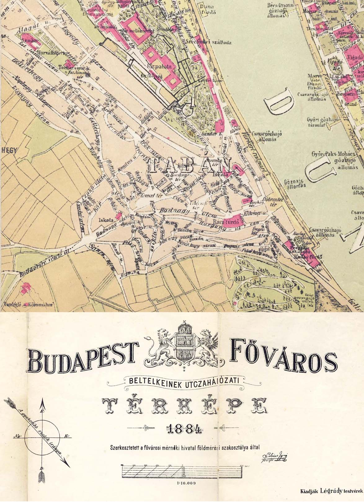 A Tabán térképe 1884-ből, Légrády testvérek kiadása